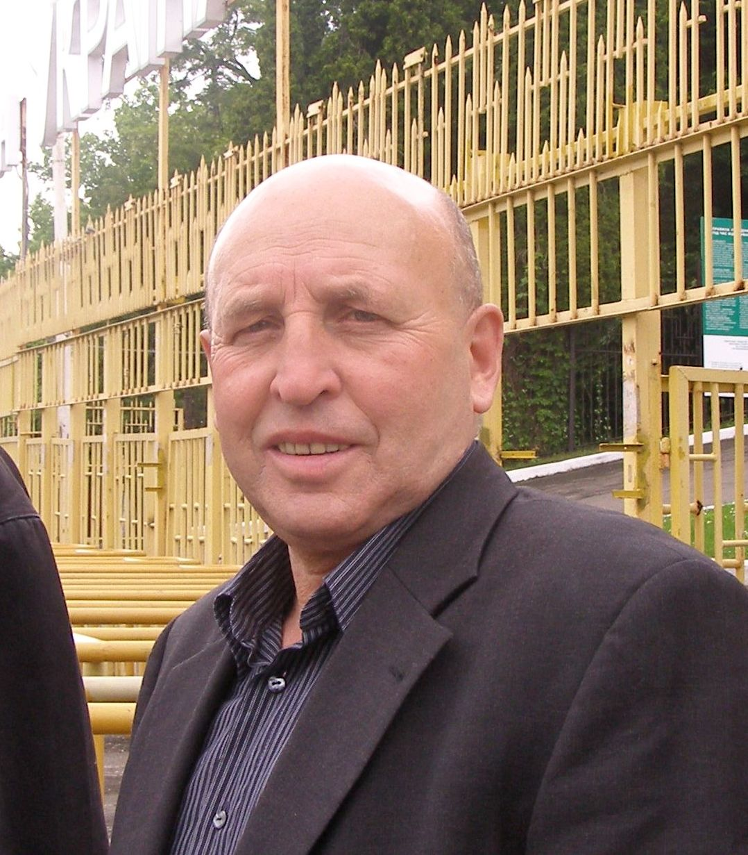 Ihor Kultschytskyj - sowjetischer Fußballspieler